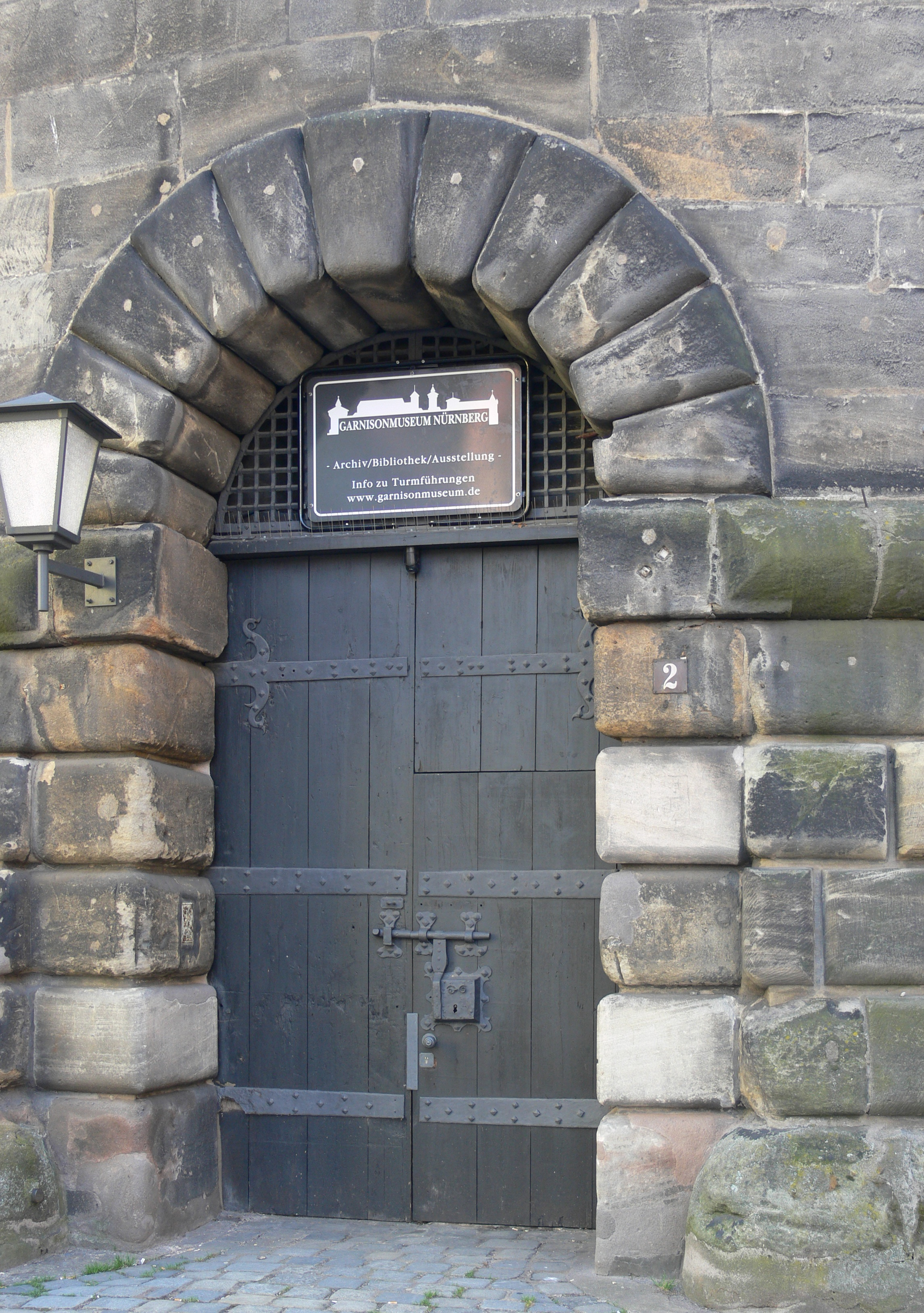 Nürnberg, Eingang zum "Garnisonsmuseum" im Spittlertorturm